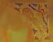 Detall Tapís de la Creació. segles XI-XII